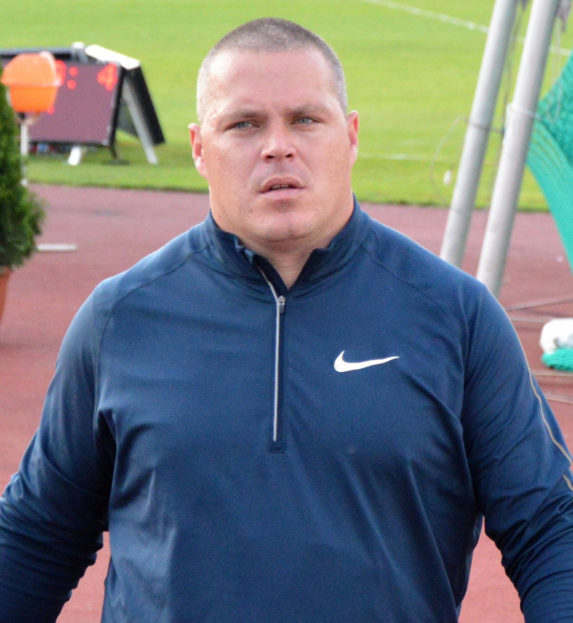 Pars Krisztián olimpiai bajnok magyar kalapácsvető